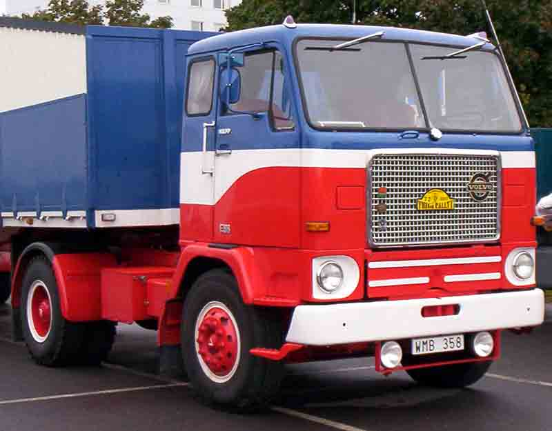 Volvo F88-49T Truck 1966